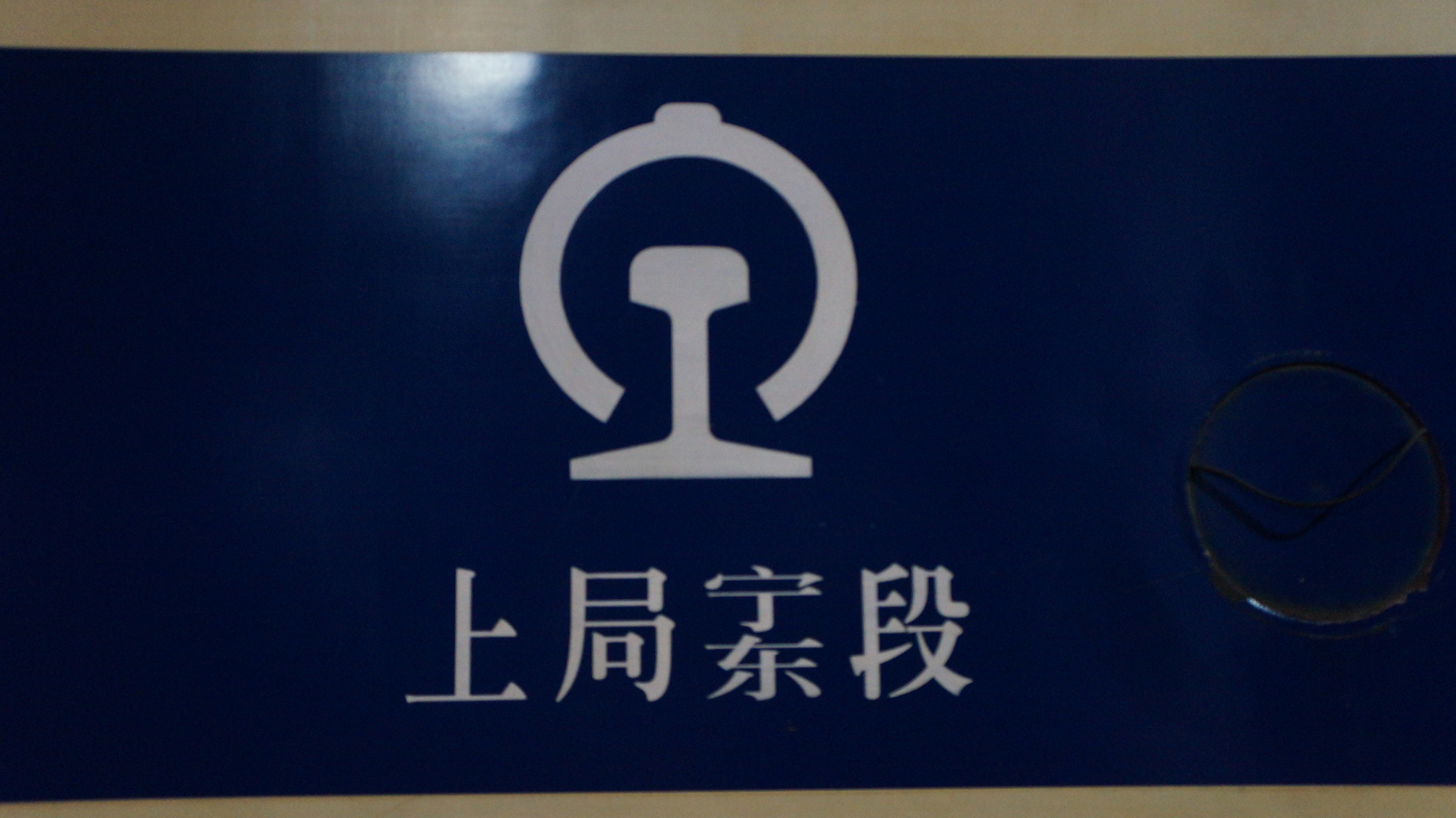 配属南京东机务段的DF11，拍摄于黄山站，为1月3日7102次本务